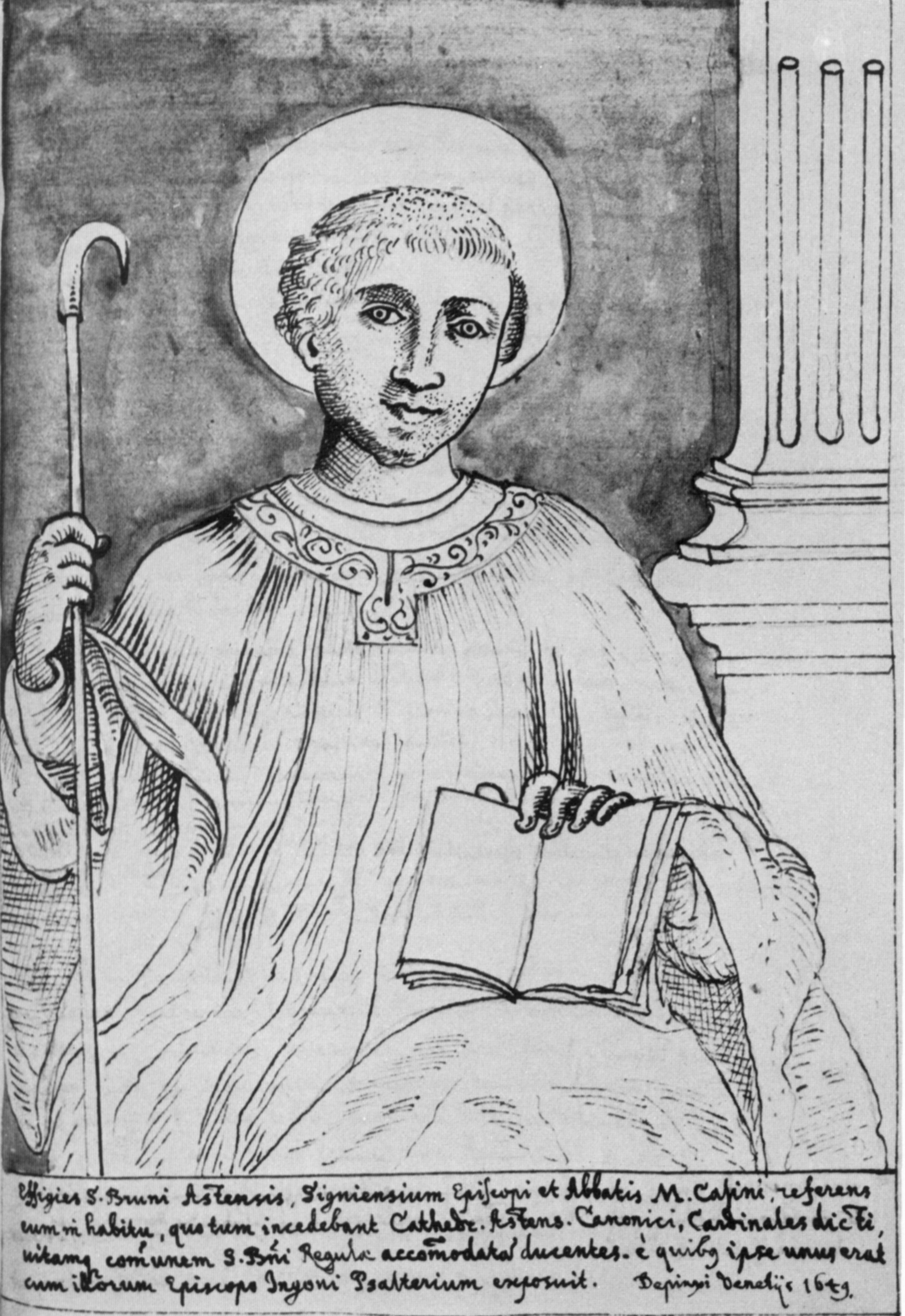 Abtbischof Bruno von Segni, † 1123, gezeichnet 1649, aus: Württembergische Landesbibliothek, HB V 15 fol 417r